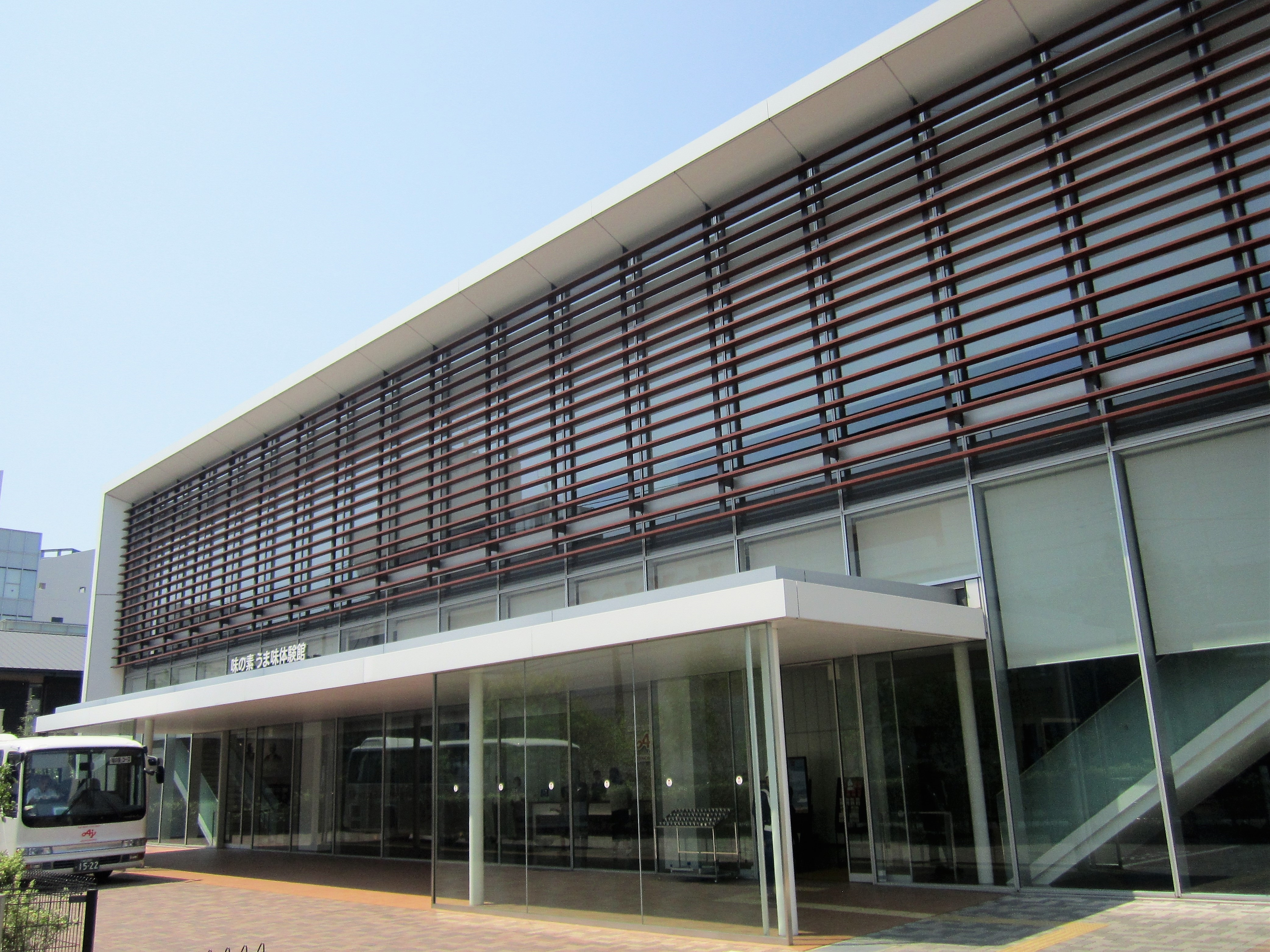 味の素グループうま味体験館（川崎市川崎区鈴木町）